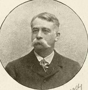 Constantijn Muysken (1843-1922), architect.